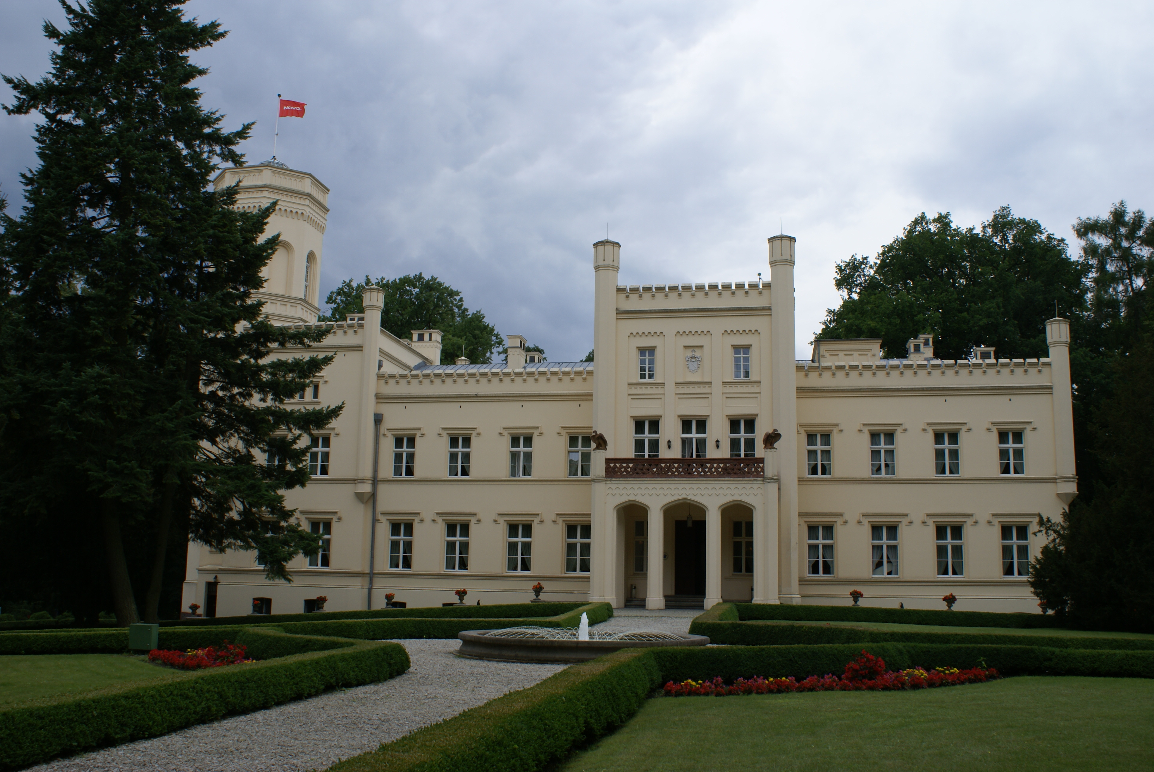 Mierzęcin - zespół pałacowy z 2. połowy XIX w.: pałac (zabytek nr 3)